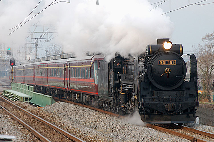 JNR D51 steam locomotive, "SL Ozasiki-Yutori gou". D51 498号機牽引による快速｢SLお座敷ゆとり号｣。上越線八木原-群馬総社間にて。手ブレ写真を無理矢理補正しています(^-^